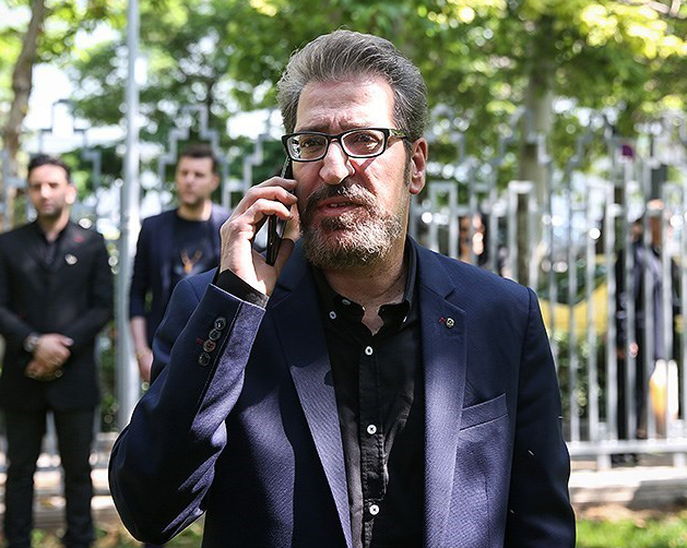 قاسم افشار ۱۶ ارديبهشت ۱۳۹۷ تالار وحدت تهران